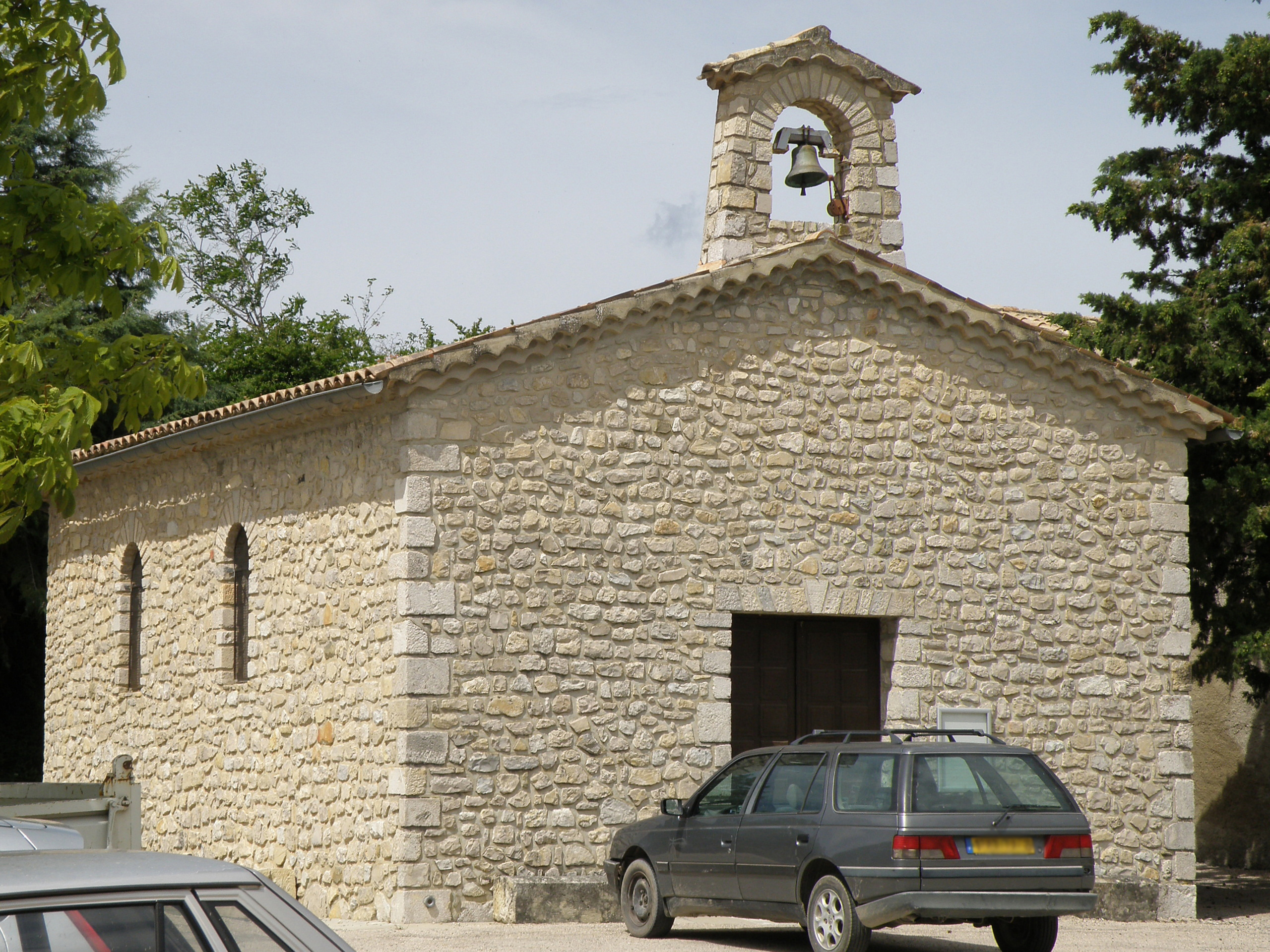 Vercoiran (Drôme, France). Église paroissiale Sainte-Anne, dans le vieux village perché.